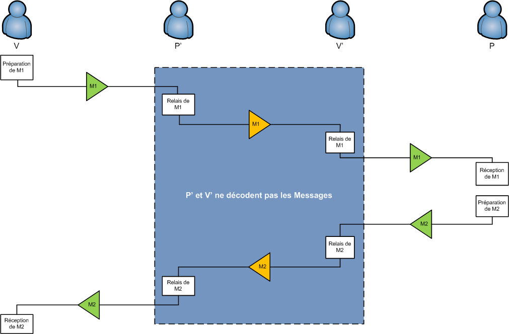 Principe de la Mafia Fraud